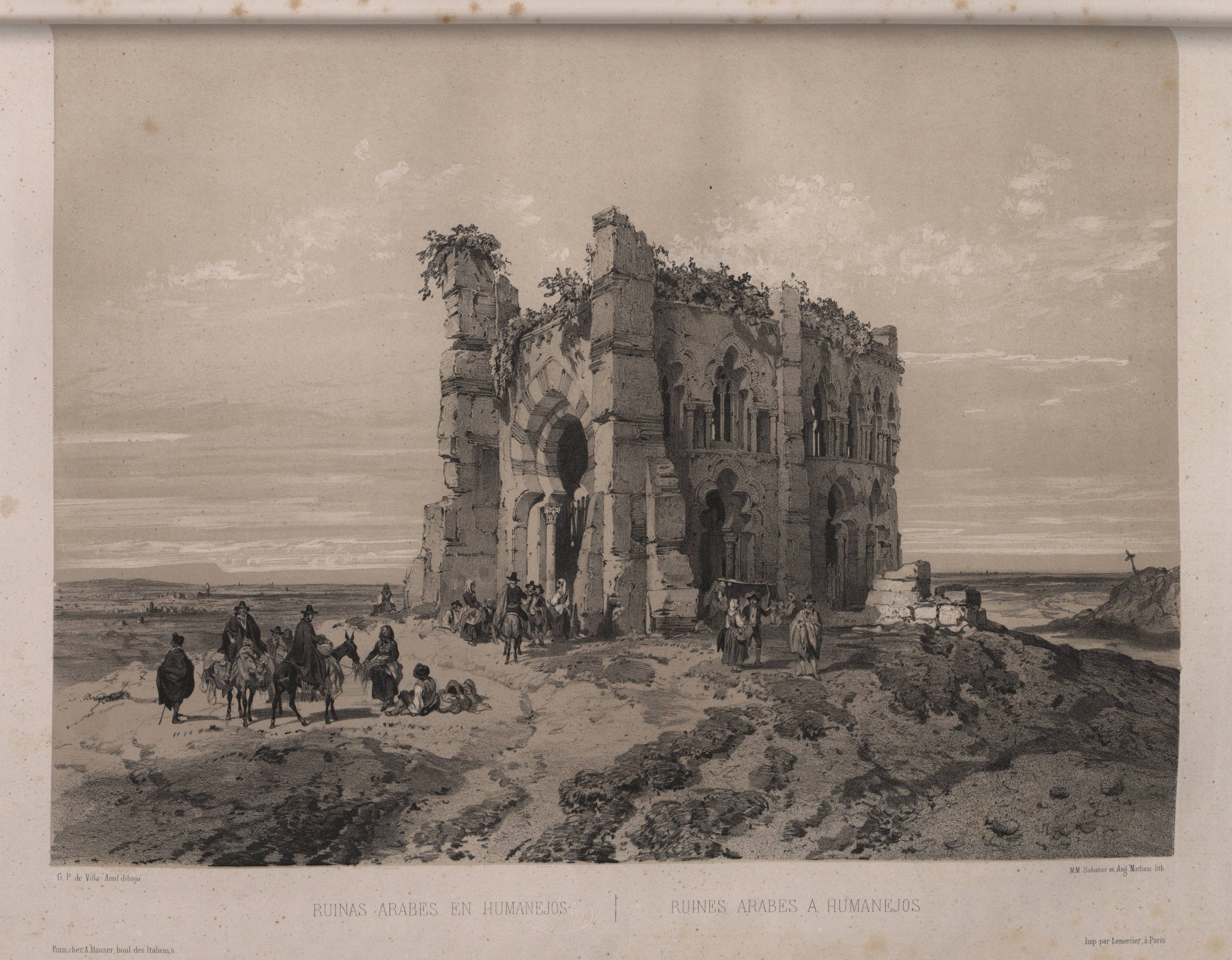 Muslim ruins in Humanejos (Madrid), in 1850, in España artística y monumental (Note: signed by Léon Jean-Baptiste Sabatier and Auguste Mathieu).